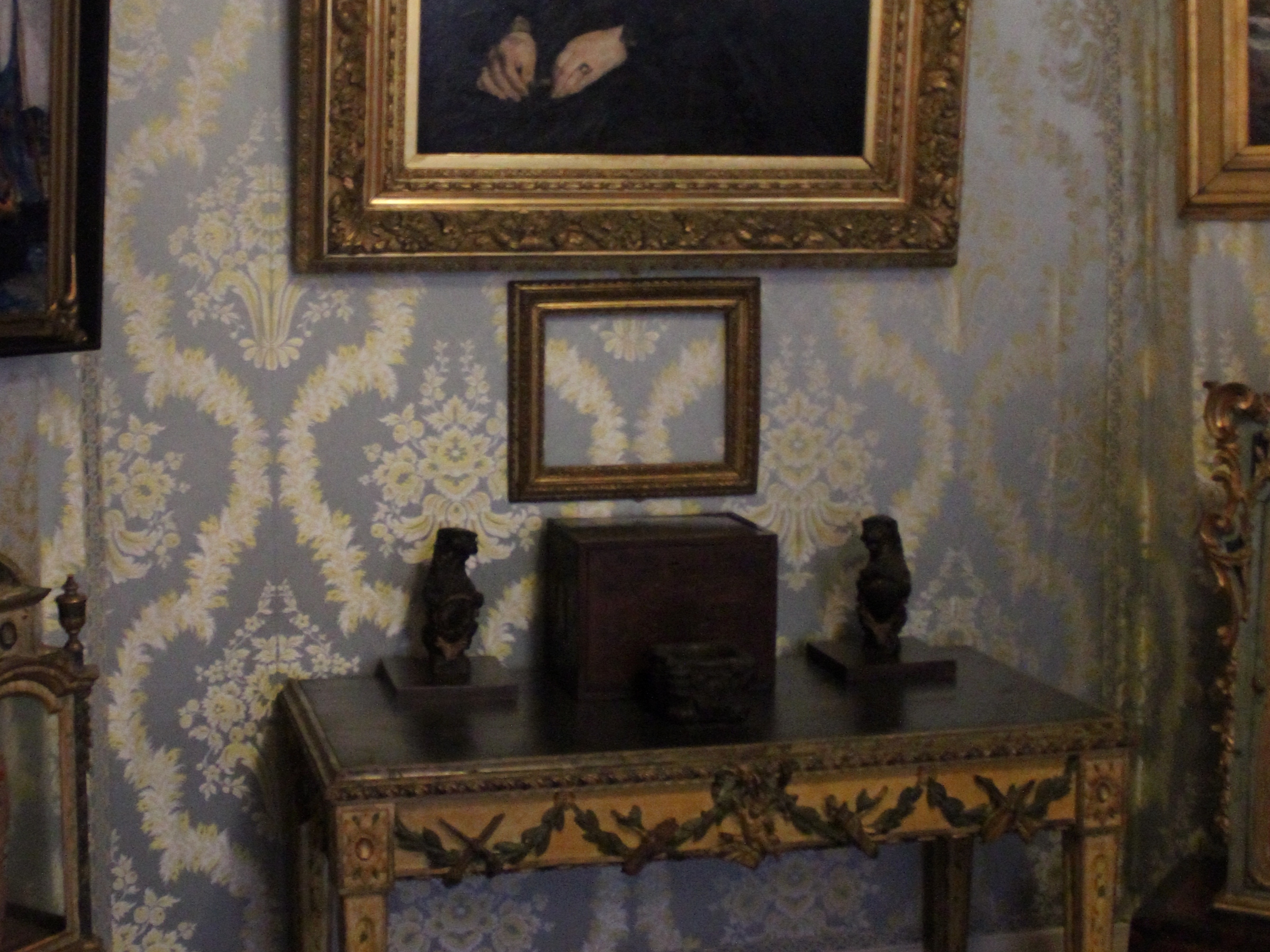 Boston, Fenway Court (Isabella Stewart Gardner Museum). Interior.